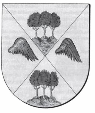 Escut de la Família Almúnia, Senyors de Xeraco -La Safor, País Valencià, Europa-.